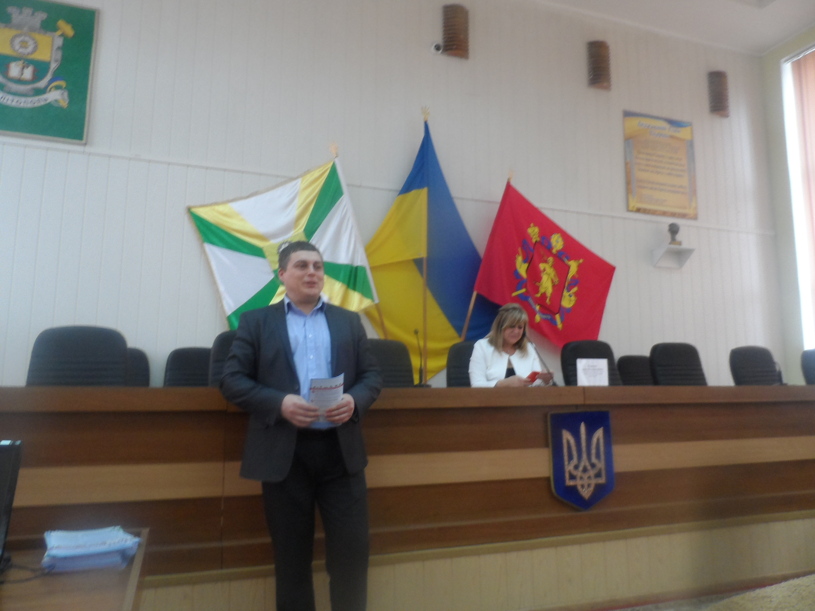 Депутат